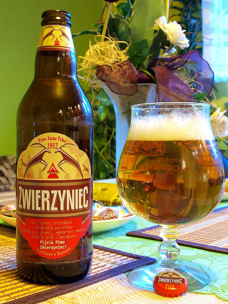 Jasne Pełne, pasteryzowane